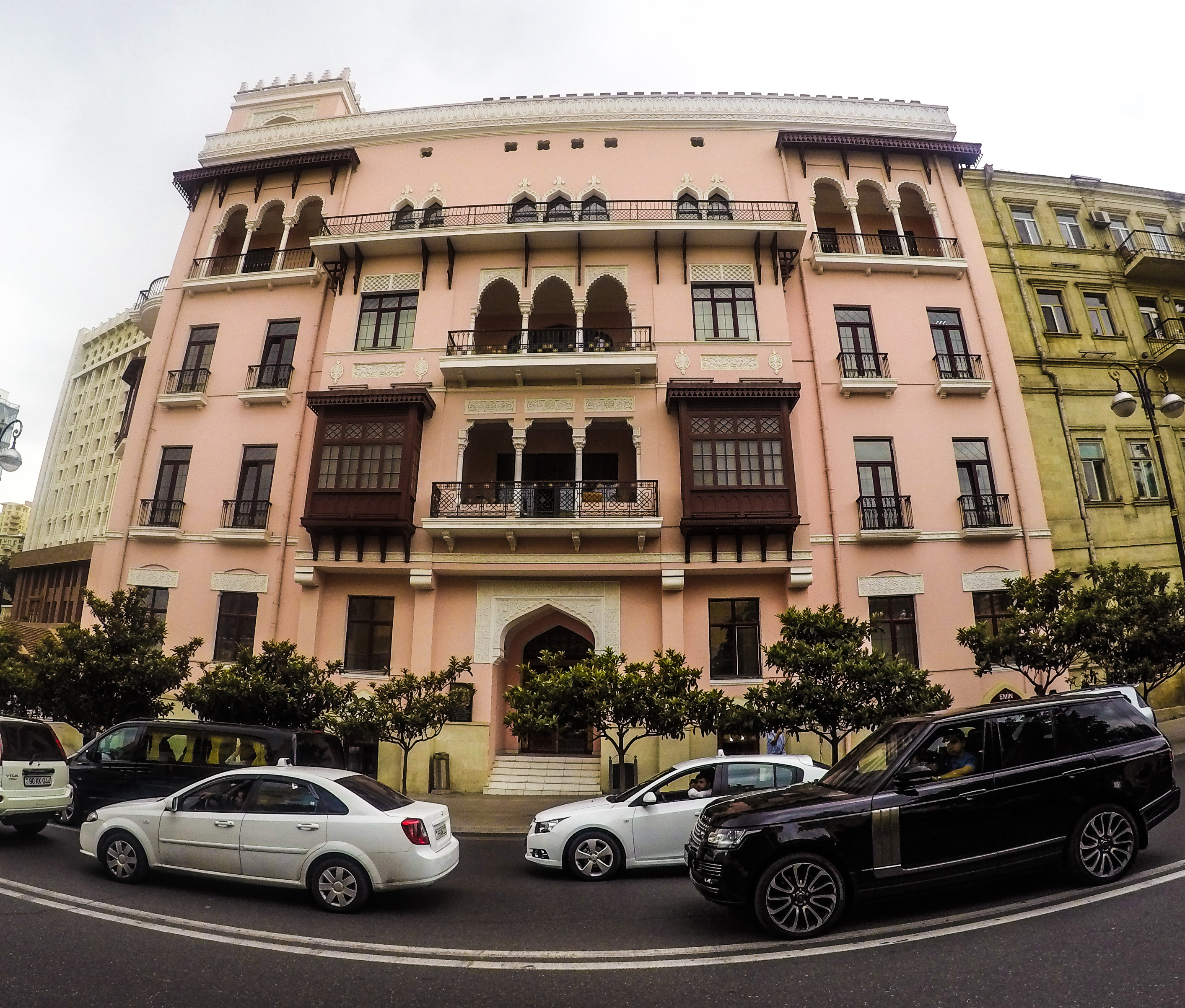 Sadıxovların evi